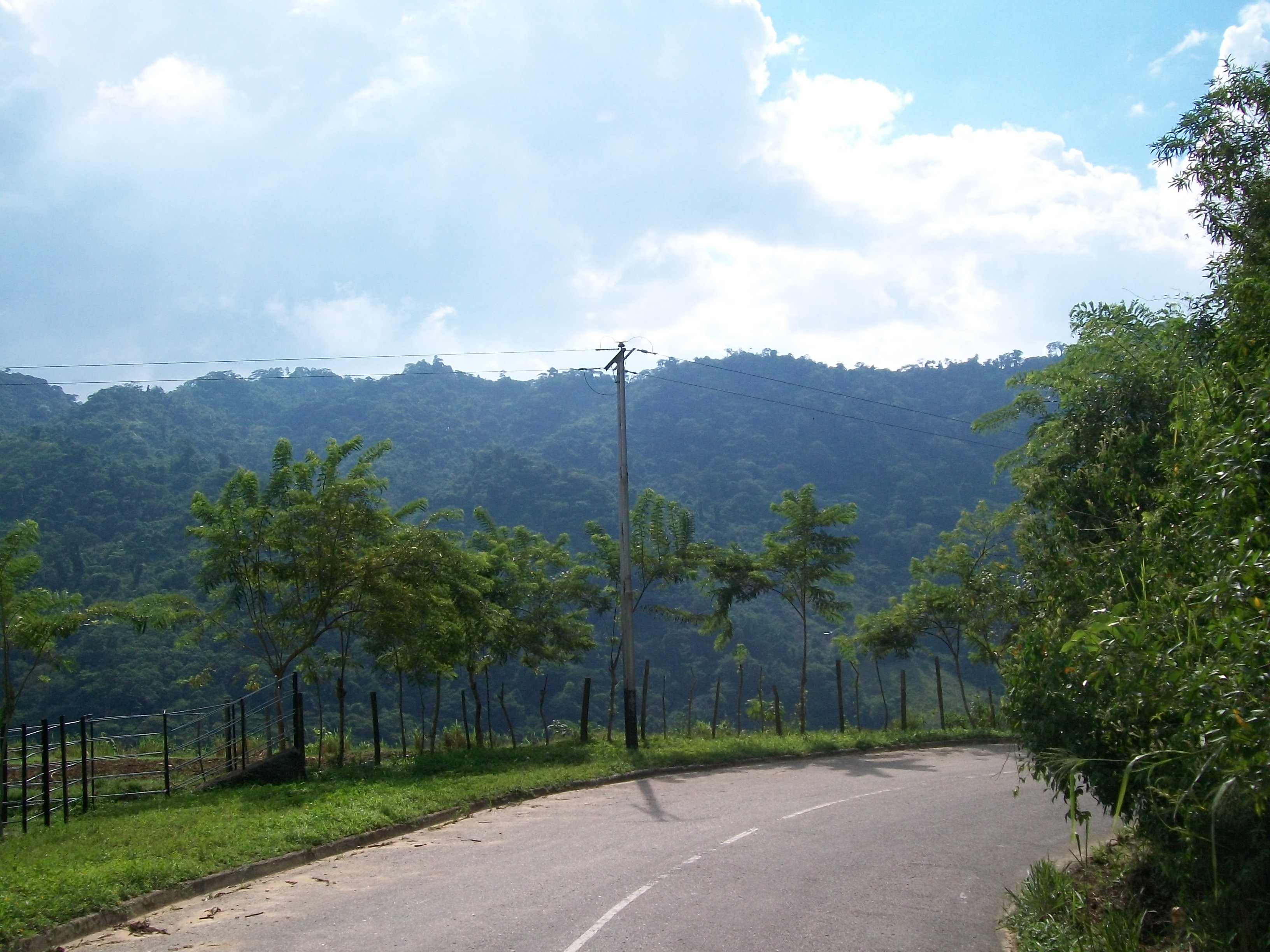 Edo. Carabobo